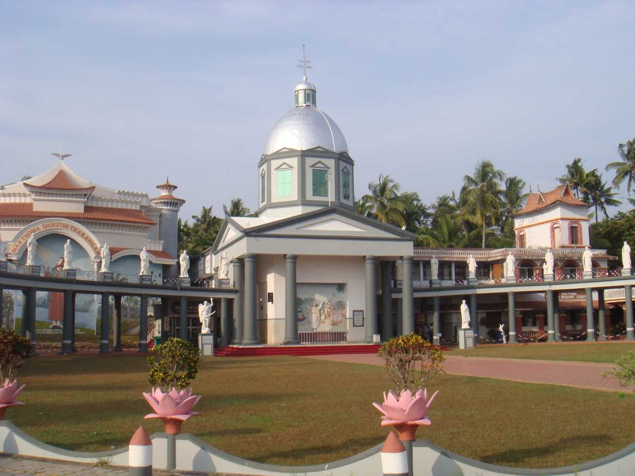 മാർത്തോമ്മാലയം അഴീക്കോട് (തൃശൂർ). കേരളത്തിലെ ക്രൈസ്തവസഭയുടെ പിള്ളത്തൊട്ടിൽ എന്ന് തന്നെ വിശേഷിപ്പിക്കാവുന്ന പുരാതനമായ ഒരു ദേവാലയമാണിത്.